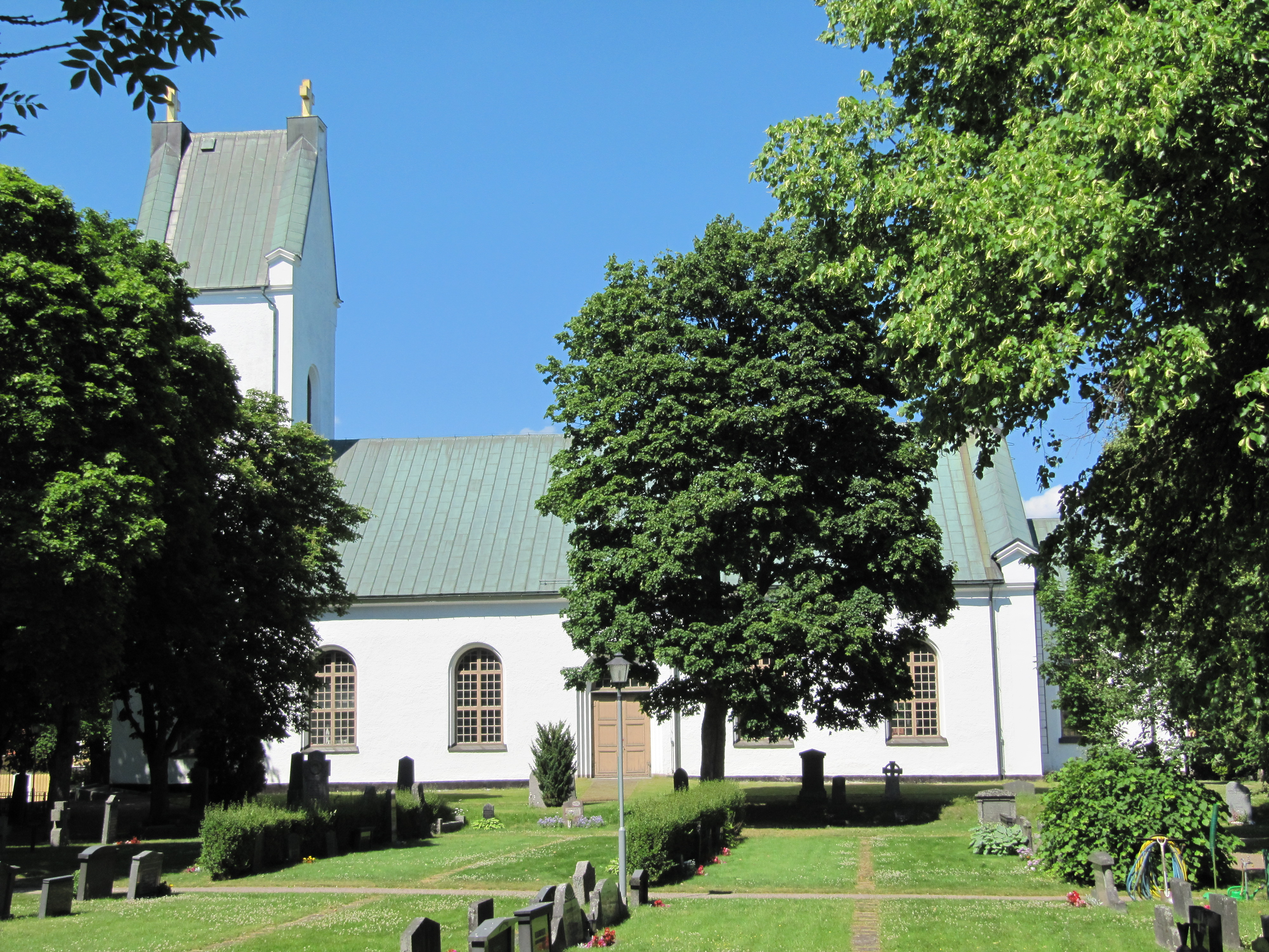 Hässleby kyrka